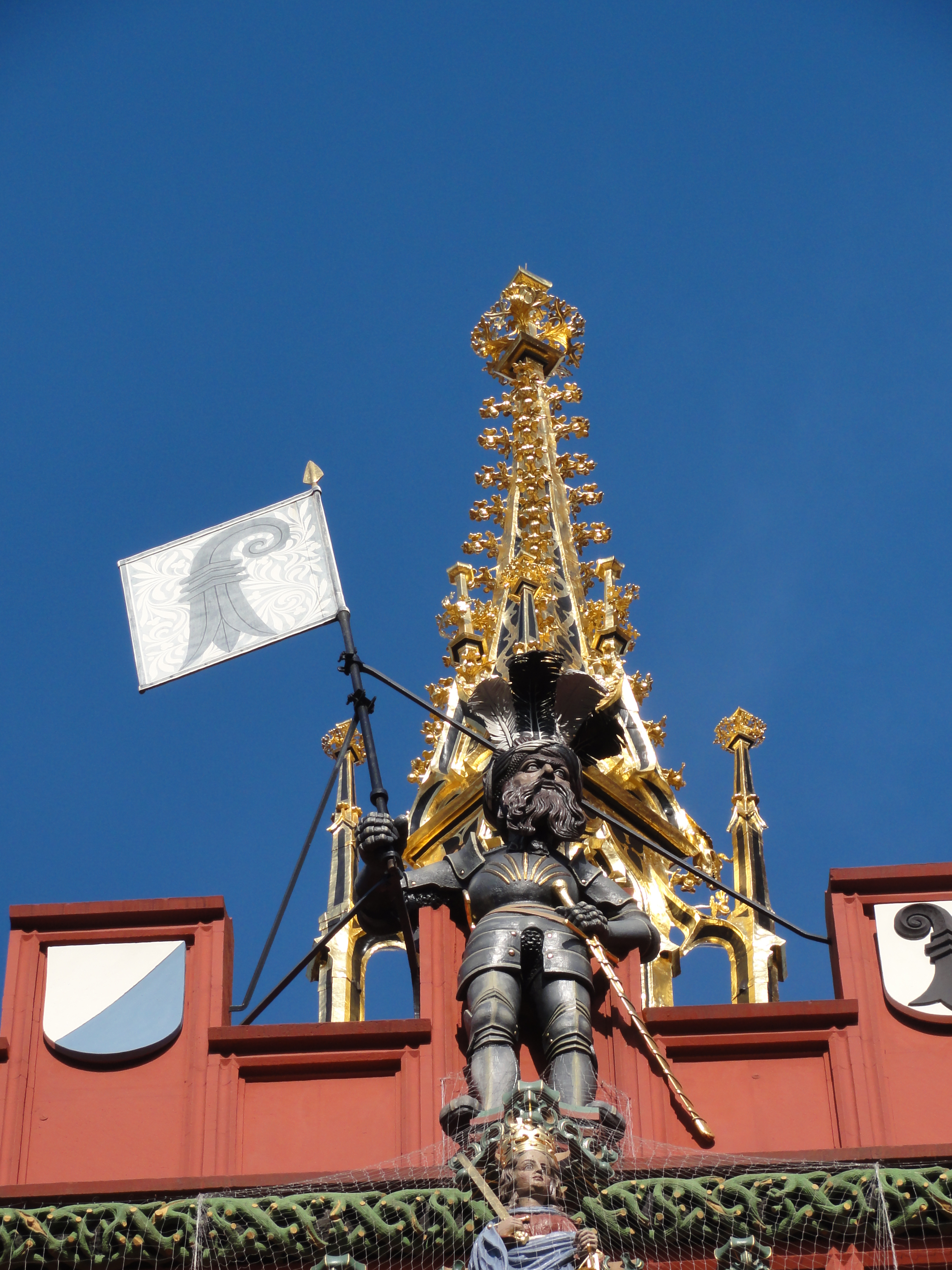 Basel, Rathaus, Schaufassade — Ritter und gotischer Glockenturm